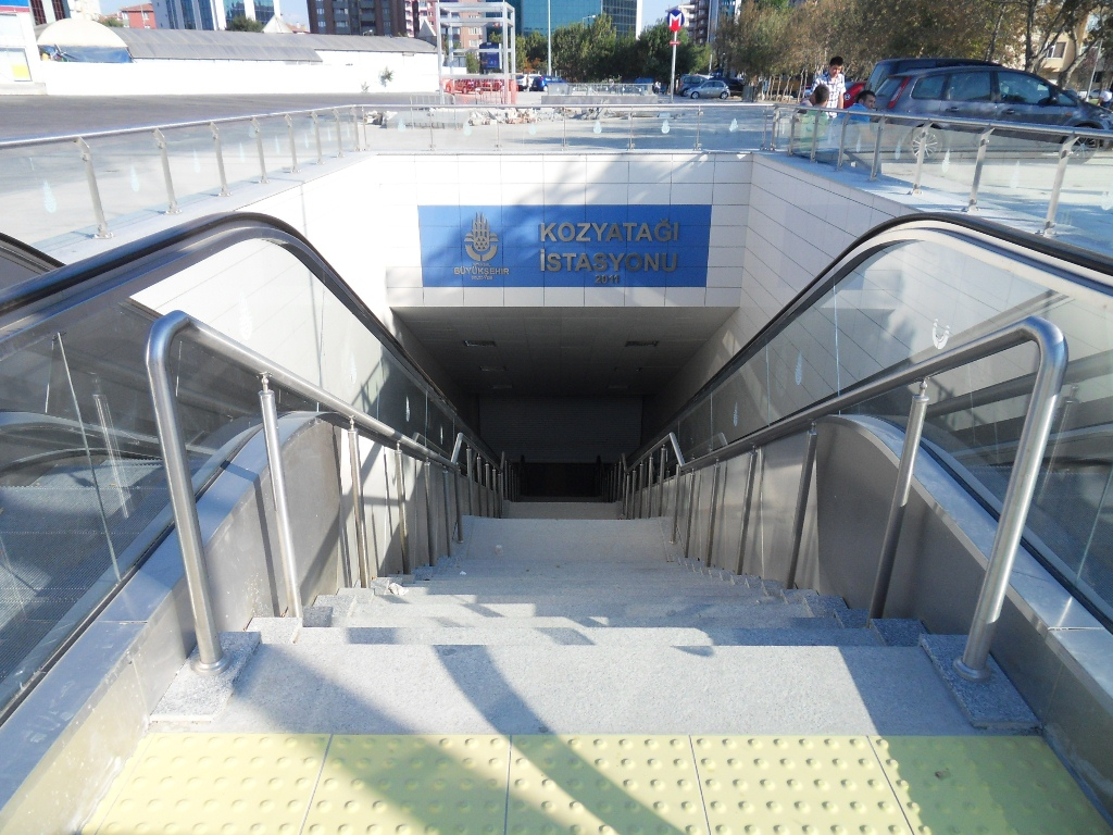 Kozyatağı M4 istasyonu engelli asansörü